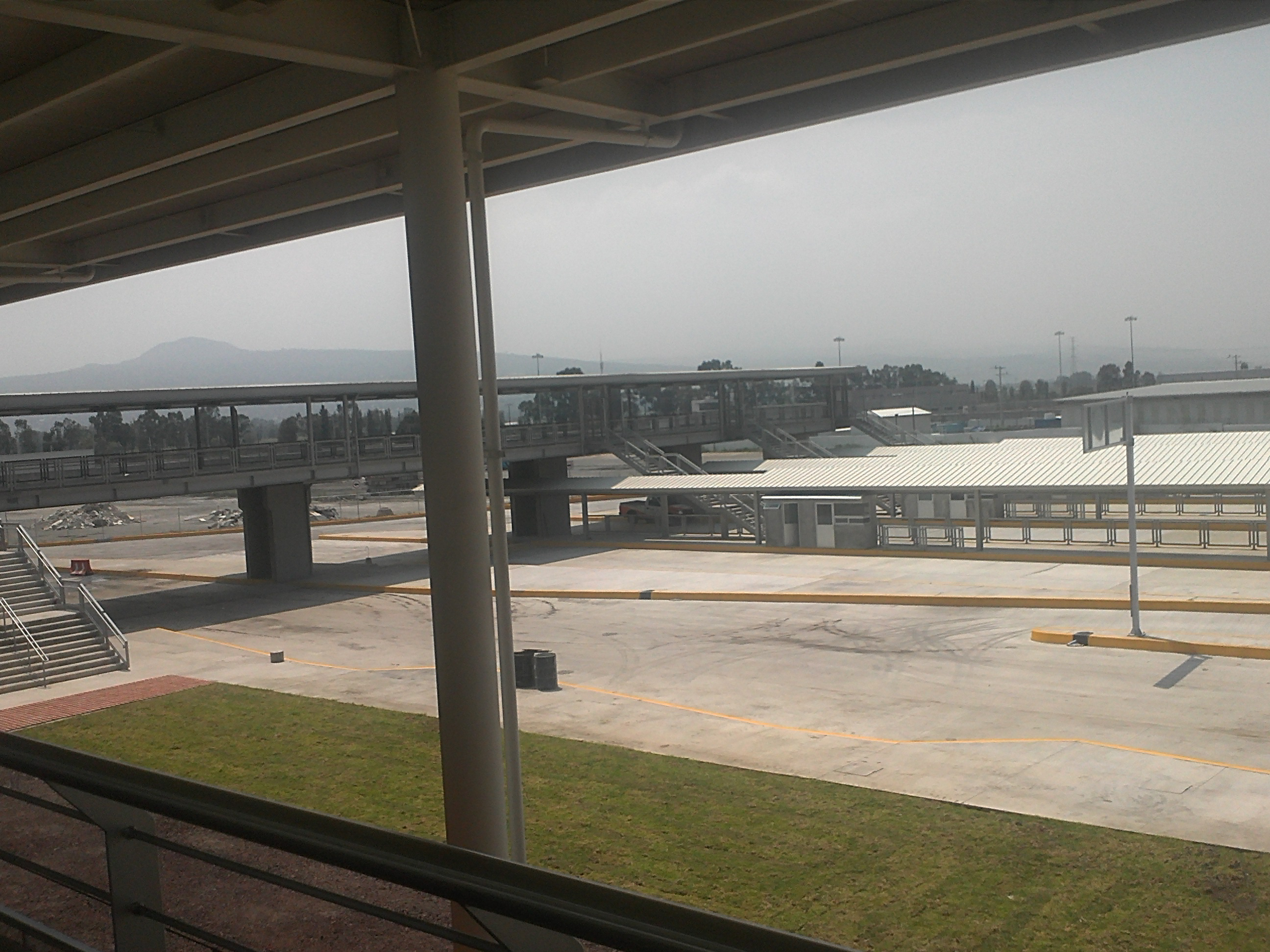 Vista desde el nivel mezzanine, de la estacion Tlahuac de la linea 12, del CETRAM Tlahuac, aun fuera de funcionamiento